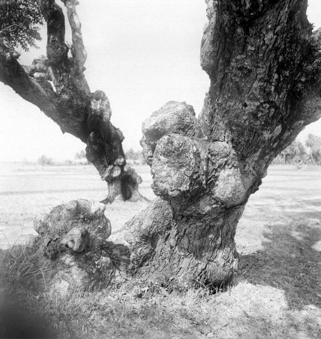 Negatief. Boom (lannea grandis) langs de weg bij Ragas aan de baai van Banten